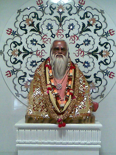 गगनगिरी महाराज समाधी